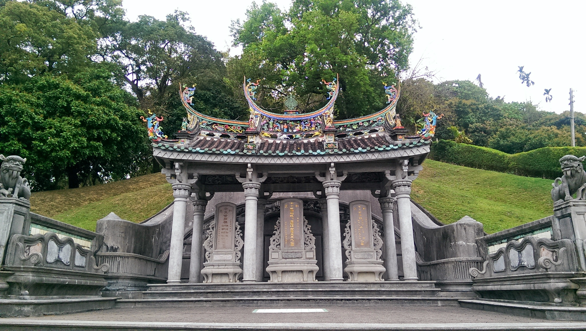 中文（台灣）: 霧峰林家祖瑩